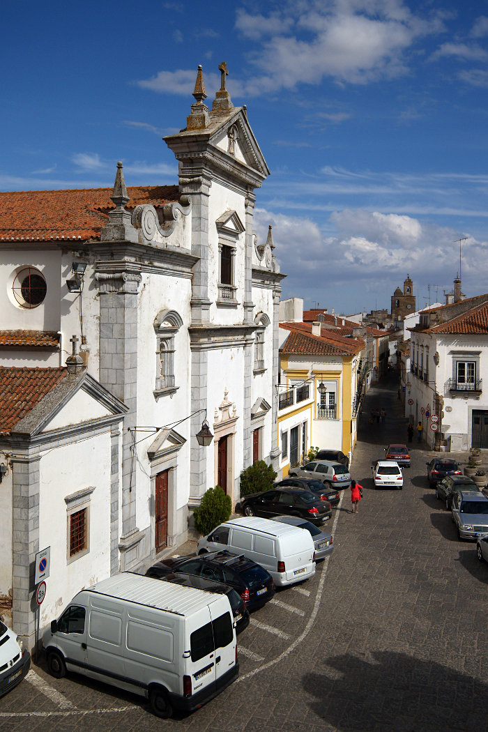 Sé de Beja